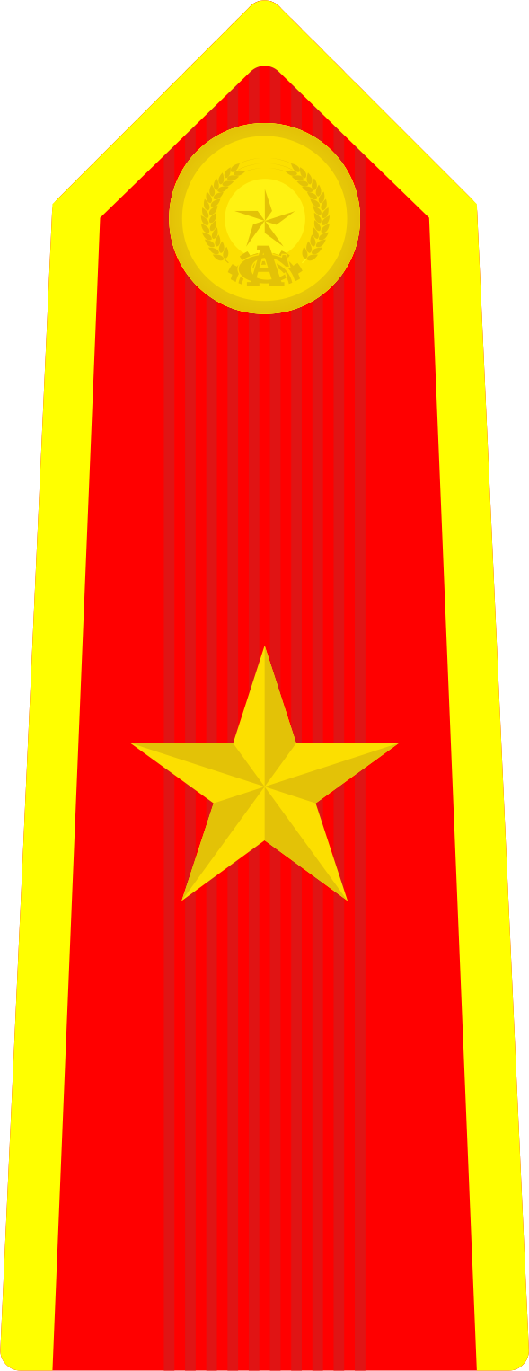 Cấp hiệu Thiếu tướng Công an